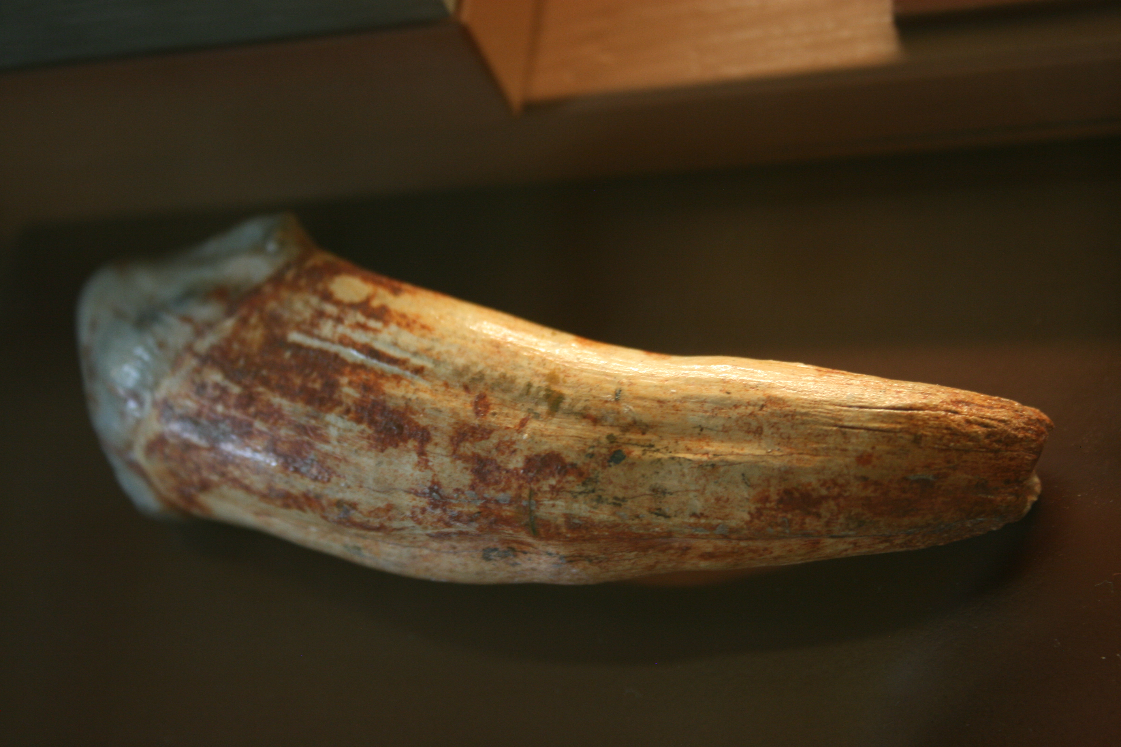 Anthracotherium Eckzahn in Wien